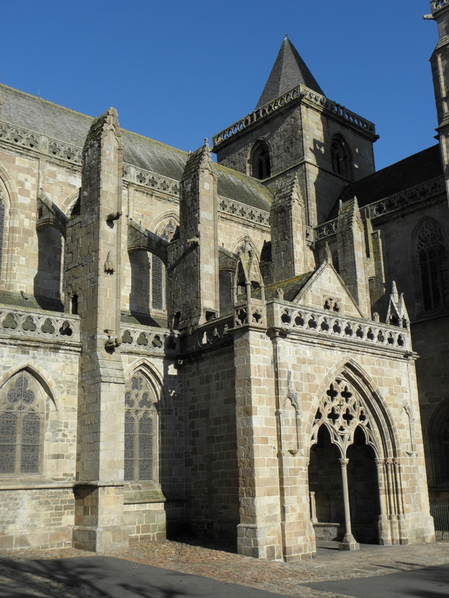 Porche du Peuple et Tour du Sanctus de la cathédrale Saint-Tudgual de Tréguier (22). .